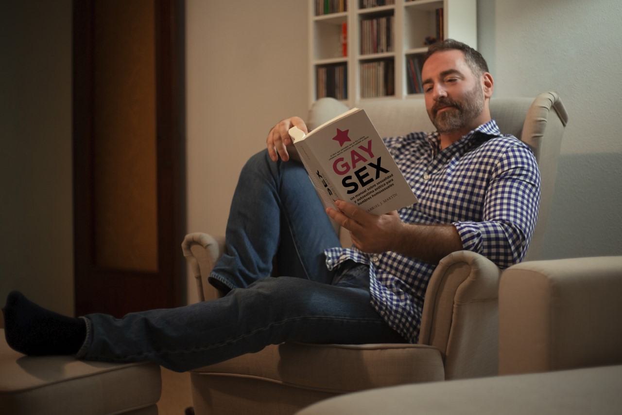 El escritor español Gabriel J. Martín.